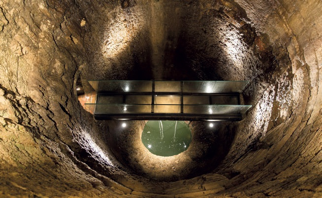 Veduta della cisterna del Pozzo etrusco con dettaglio della passerella.